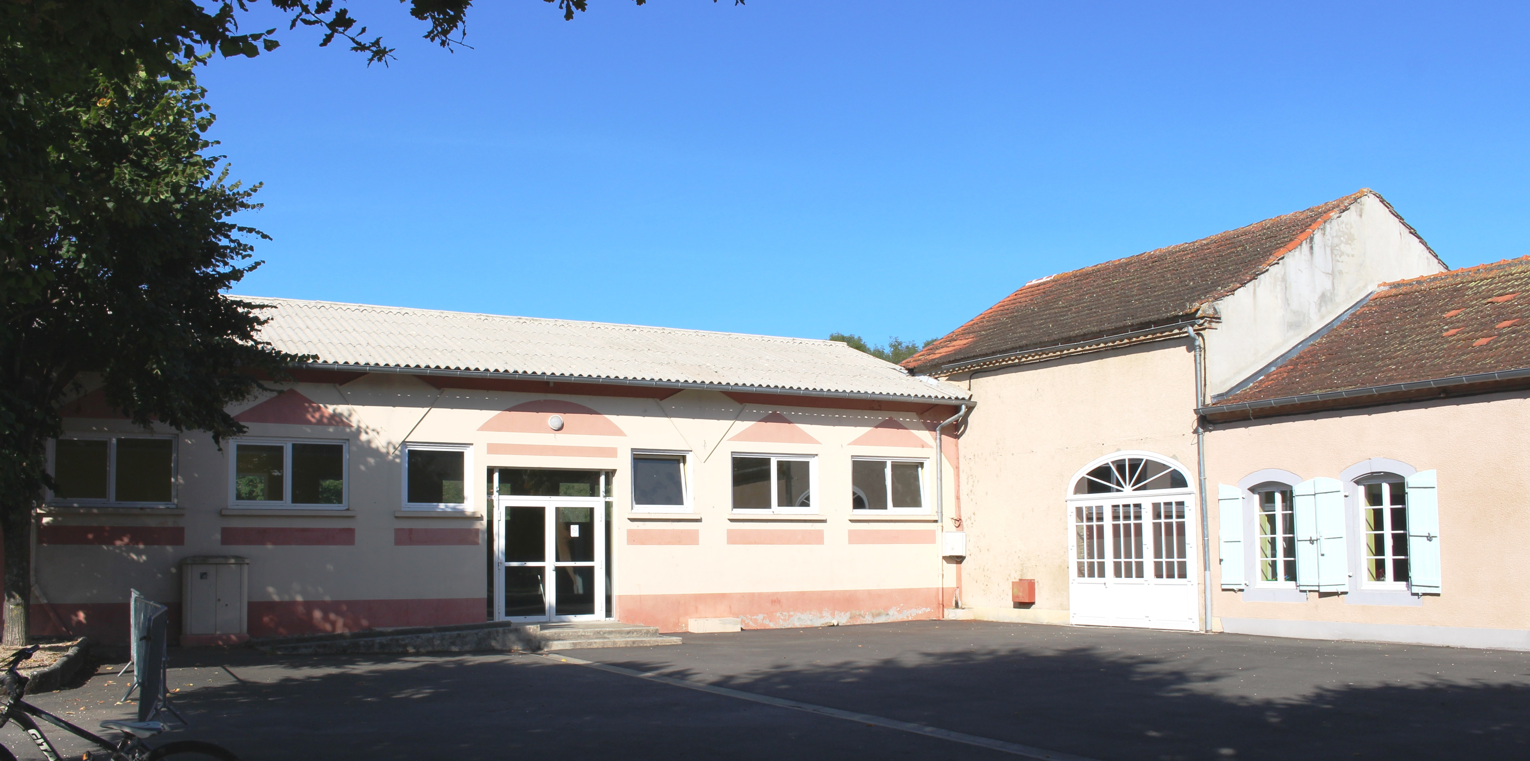 Salle des fêtes de Caixon (Hautes-Pyrénées)